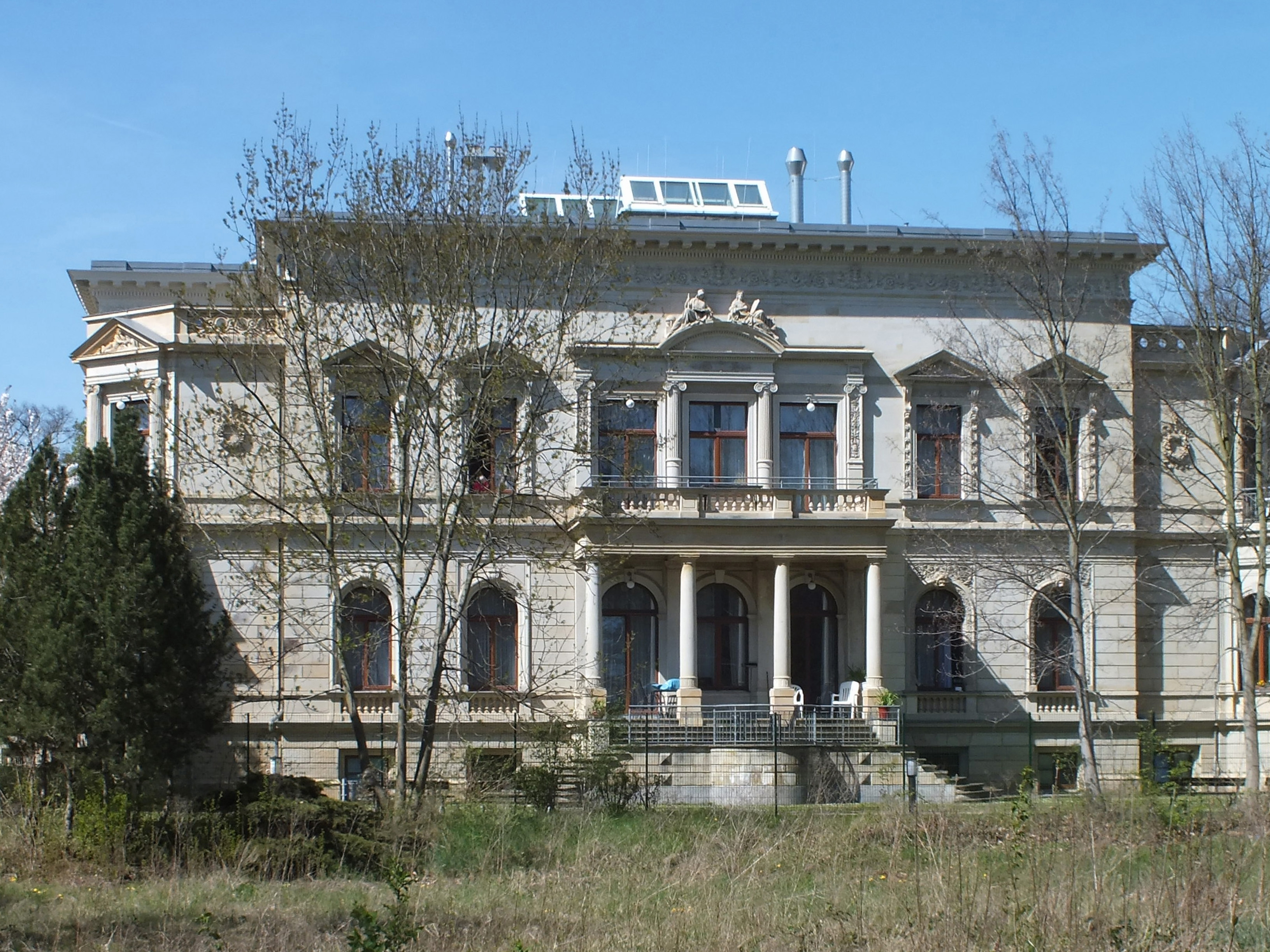 Senioren-Wohnpark Stadtpalais Leipzig (ehem. Villa Gebhardt), Südseite